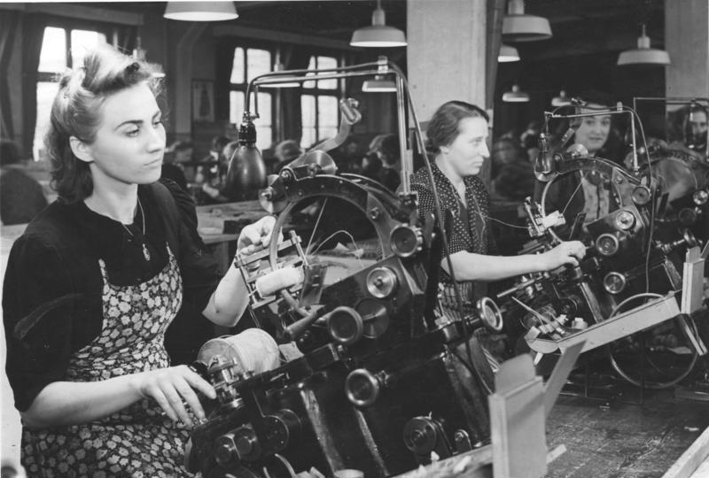 Zwangsarbeiter aus Frankreich in Berliner Siemenswerke ADN-Zentralbild-Archiv II. Weltkrieg 1939-45 Nach der Besetzung Frankreichs durch die faschistische deutsche Wehrmacht wurde die Zivilbevölkerung zur Arbeit in Deutschland zwangsverpflichtet. UBz.: Eine junge Französin, die in der Spulenfertigung der Berliner Siemenswerke für die deutsche Rüstungsindustrie arbeiten muss. (1943) 821-43 Scherl Bilderdienst, Werkfoto Siemens